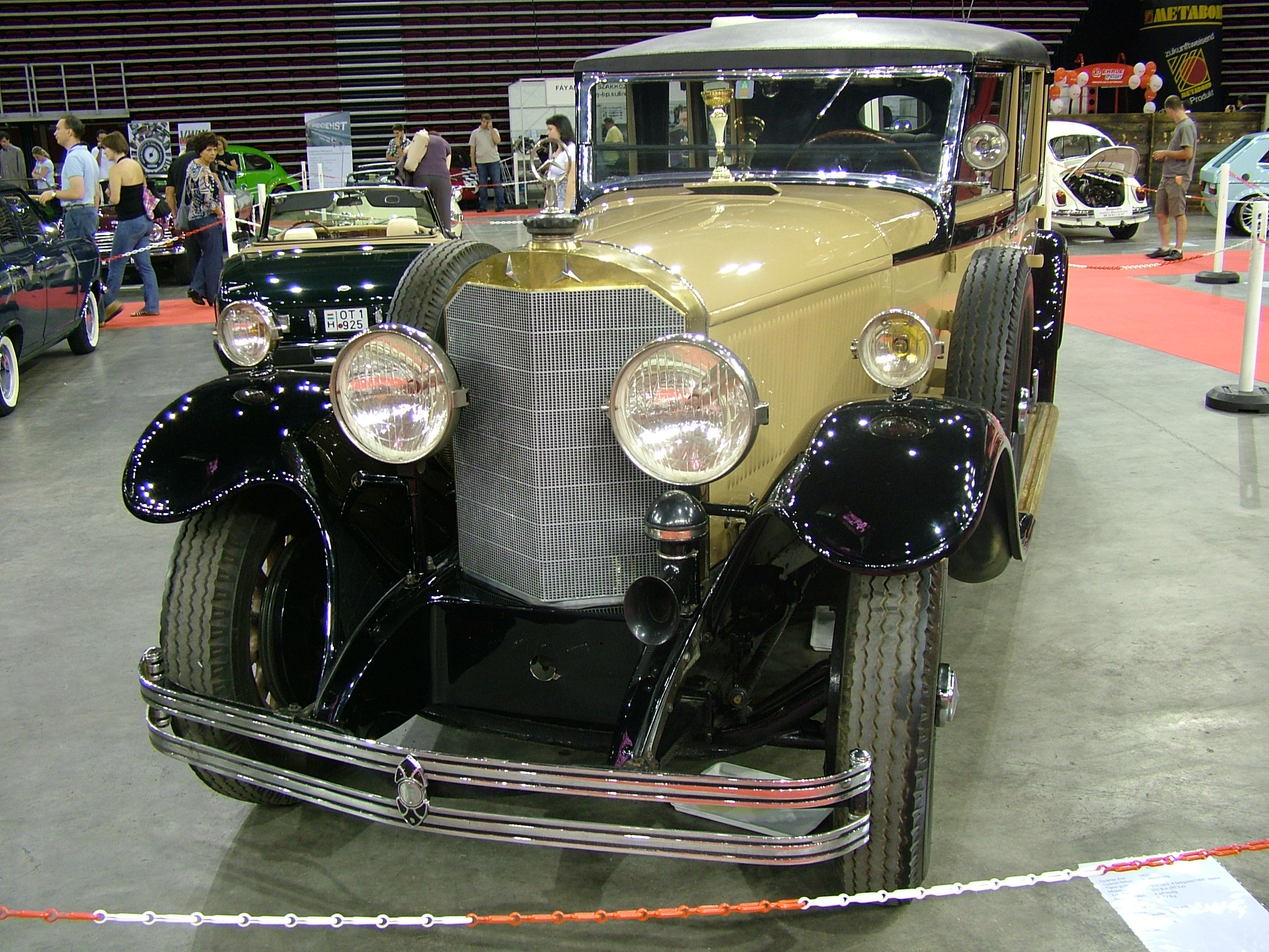 Mercedes-Benz 630K, 1927